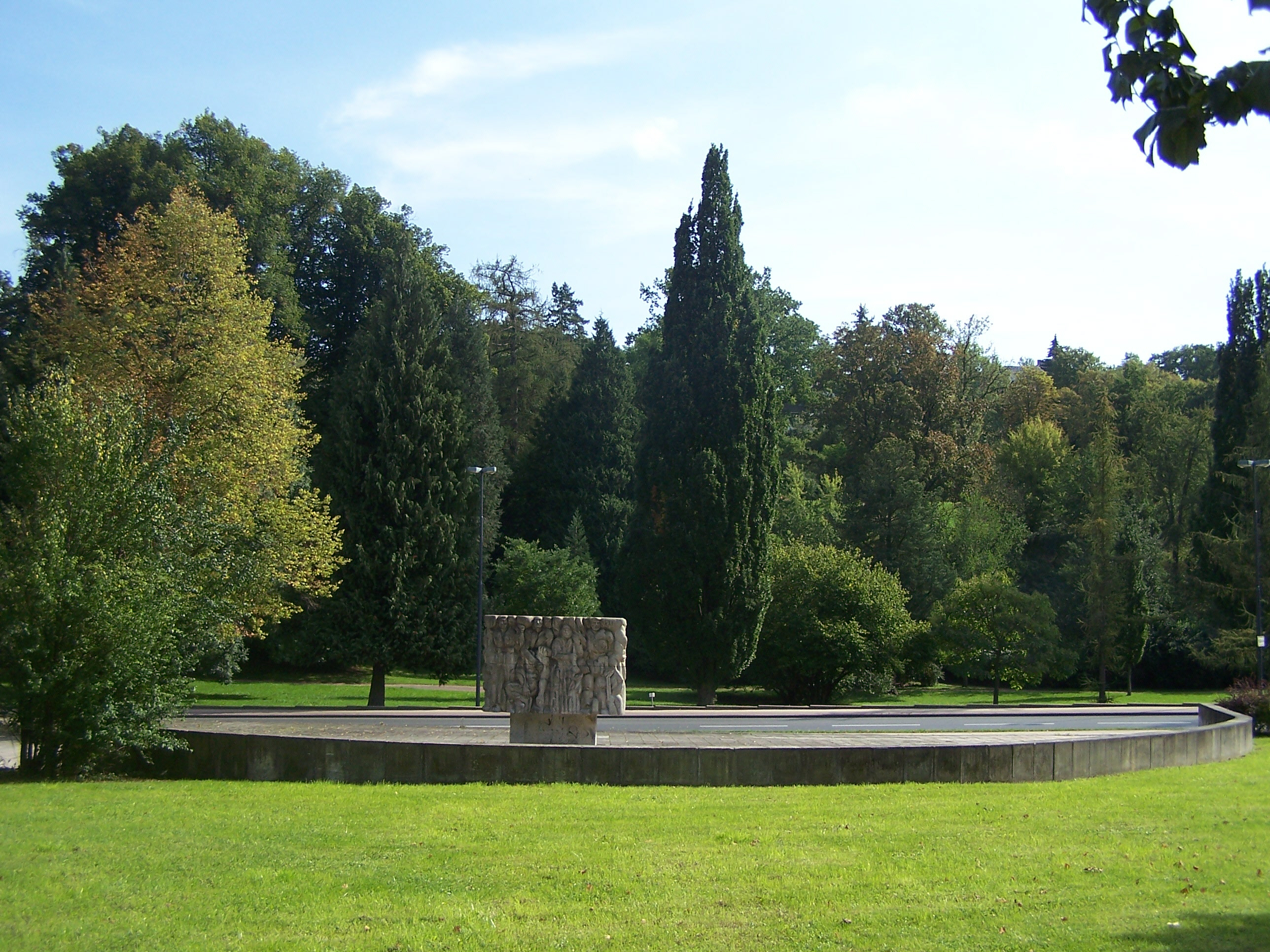 Gesamtansicht des Denkmals aus Richtung der Marienstraße.